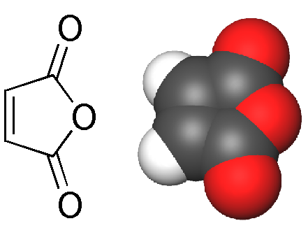 formules de l'anhydride maléique